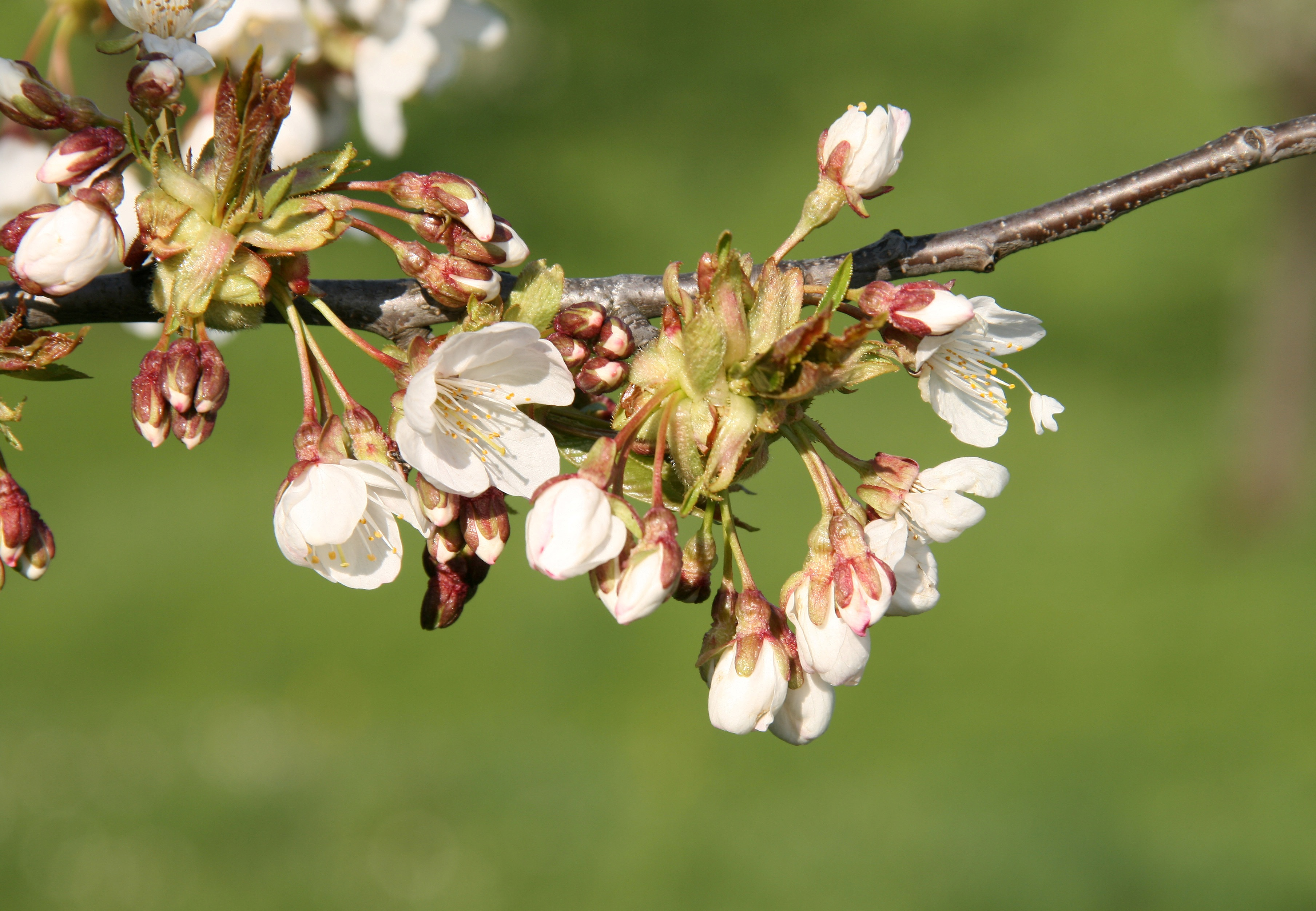 Blüte der Süßkirsche „Fraxner Kirsch“/ „Fraxner Kriasiwasser“ ist für das geographische Gebiet Fraxern in Vorarlberg geschützt im Codex Alimentarius Austriacus Kapitel B 23: Sprituosen. Anhang 1: Geschützte Bezeichnungen** Die Sorte "Klennzweiete" wird als die „echten Fraxner Kriasi“ bezeichnet. Es handelt sich um sehr kleine, süße, schwarze Kirschen, die heute als Tafelkirschen nicht mehr so gefragt sind. Eine weitere Kirschensorte ist die „Rutle“, eine schwarze, mittelgroße Sorte, die schon vor 200-300 Jahren kultiviert wurde. Ganz alte Sorten sind zum Teil schon verschwunden. Die Sorte „Große Schwarze“ kommt derzeit in Fraxern am häufigsten vor. Sie wurde wie die „Riegerkirsche“ und die „Herzen“ aus der Schweiz in die Region gebracht.